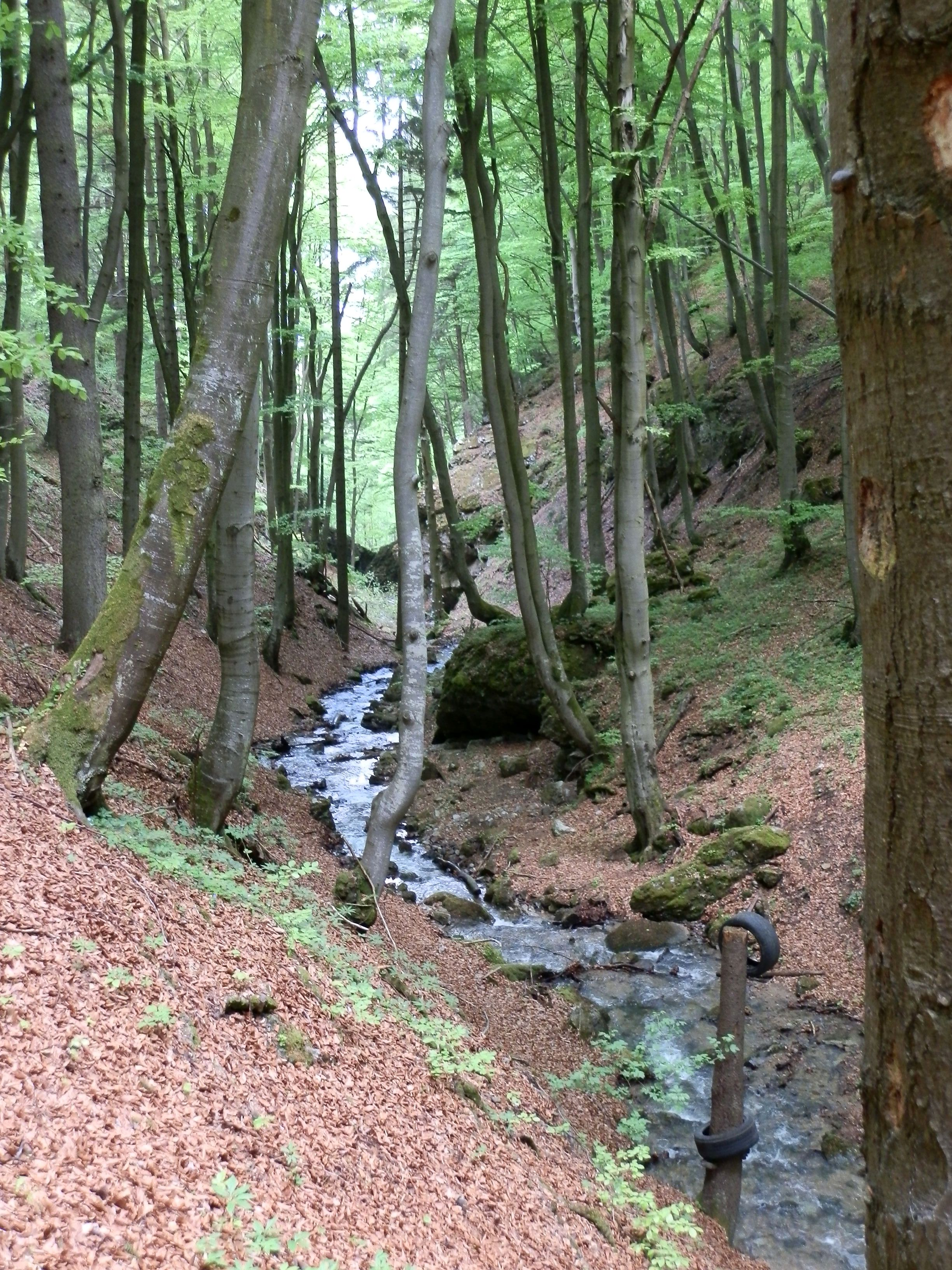 Stráňavský potok